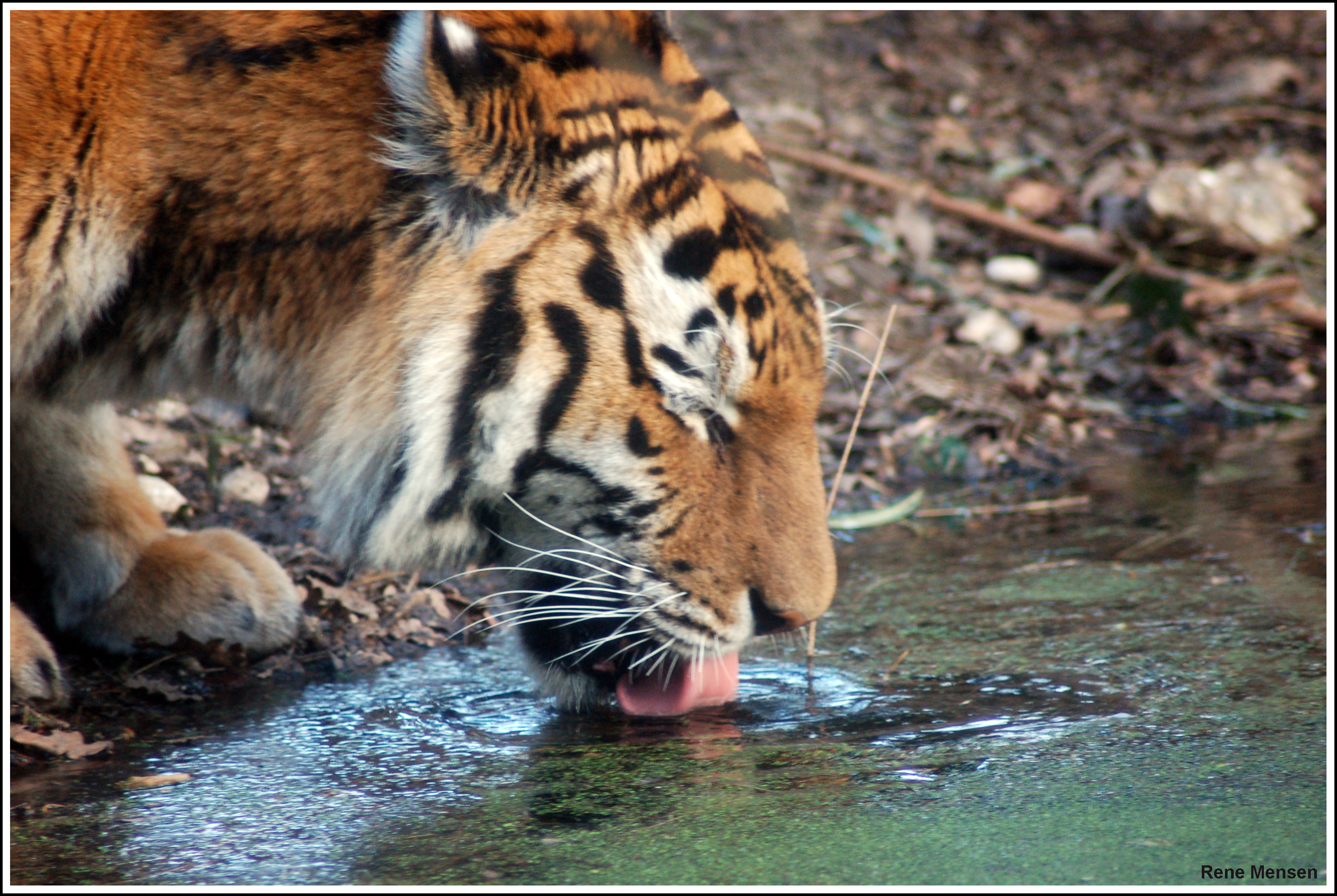 Siberian tiger